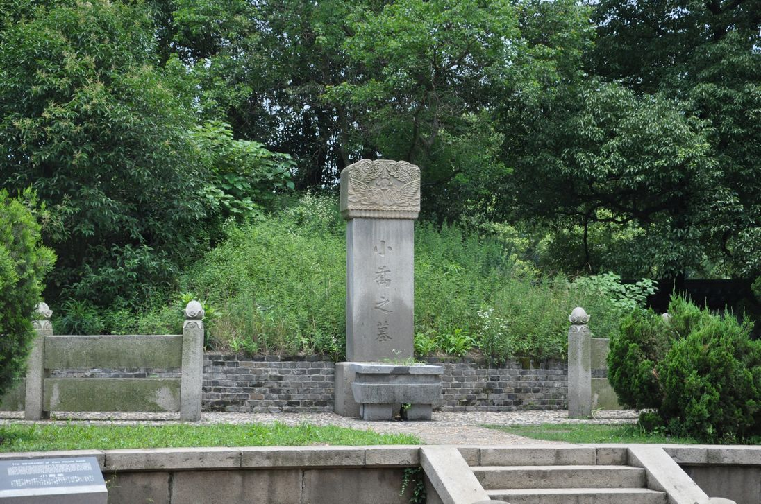 小乔墓